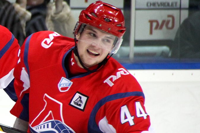 Защитник «Локомотива» Егор Яковлев